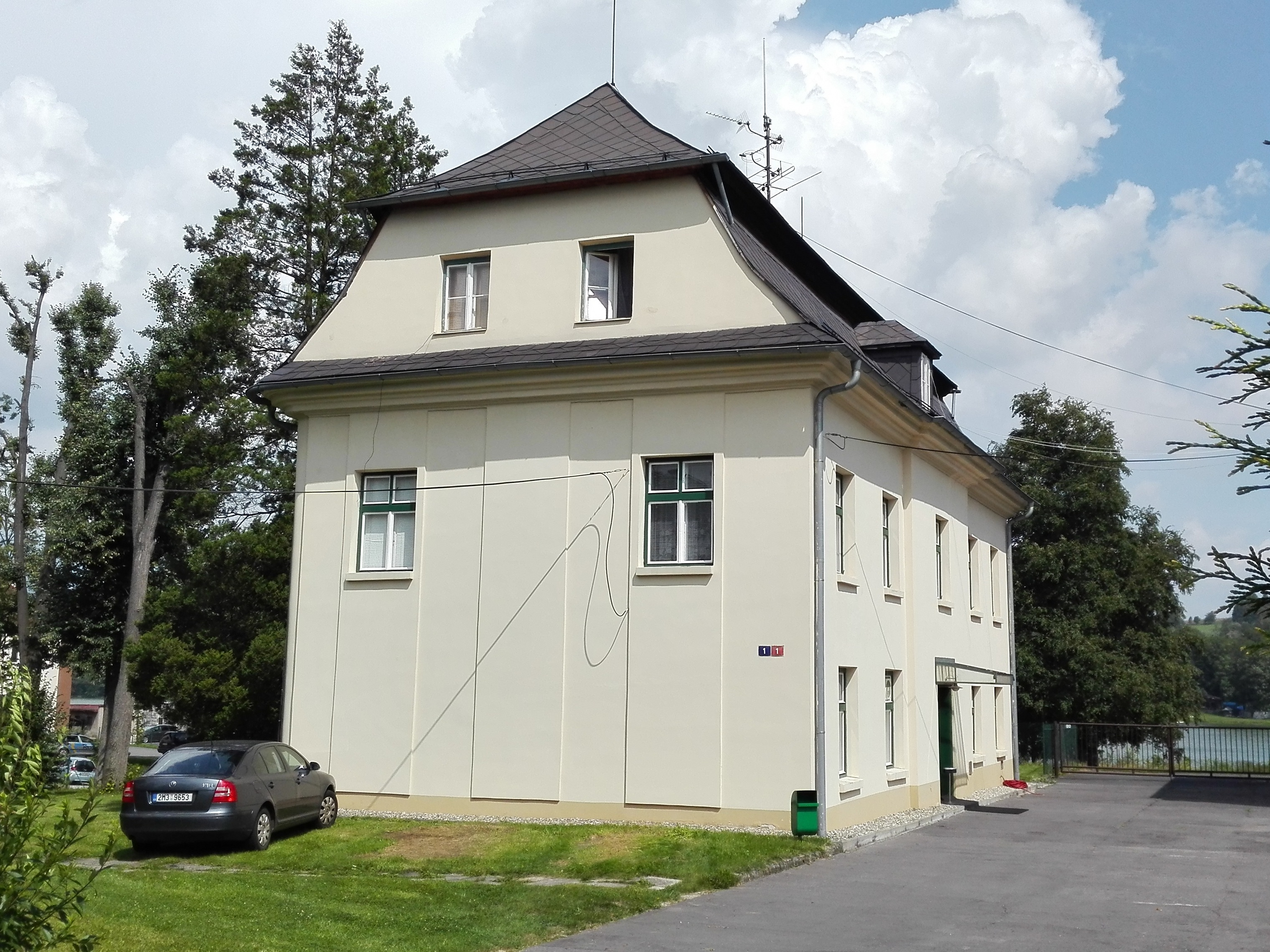 Těrlicko - skromný Larischův zámeček vystavěný na počátku 19. století. Původní zámecká zahrada se nedochovala.